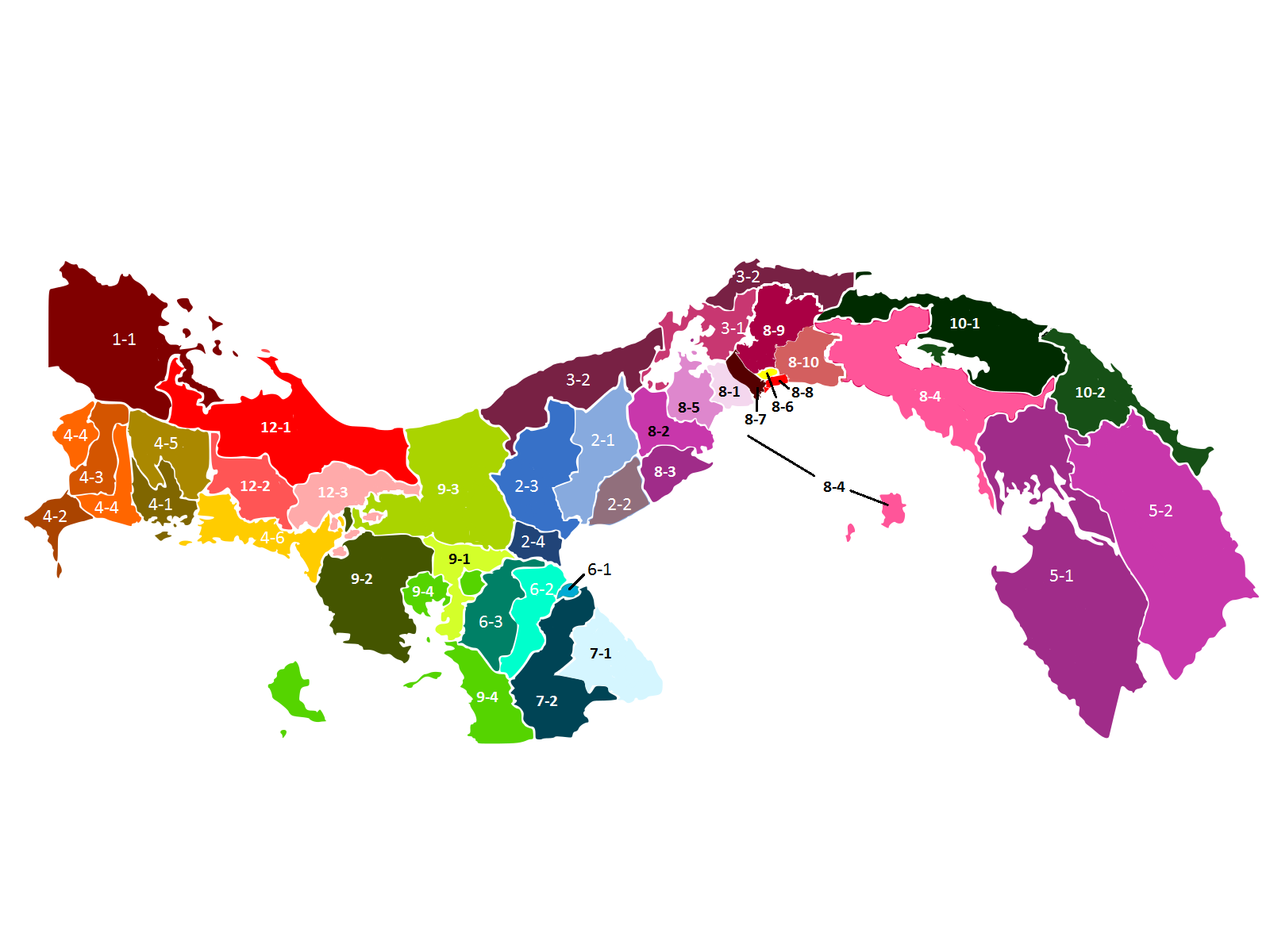 Cada uno de los circuitos de la república de Panamá